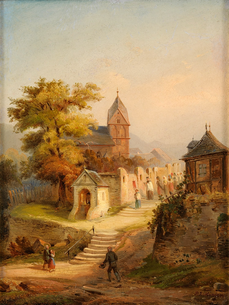 Sonntags auf dem Lande. Signiert. Öl auf Malkarton, 33 x 24,5 cm.